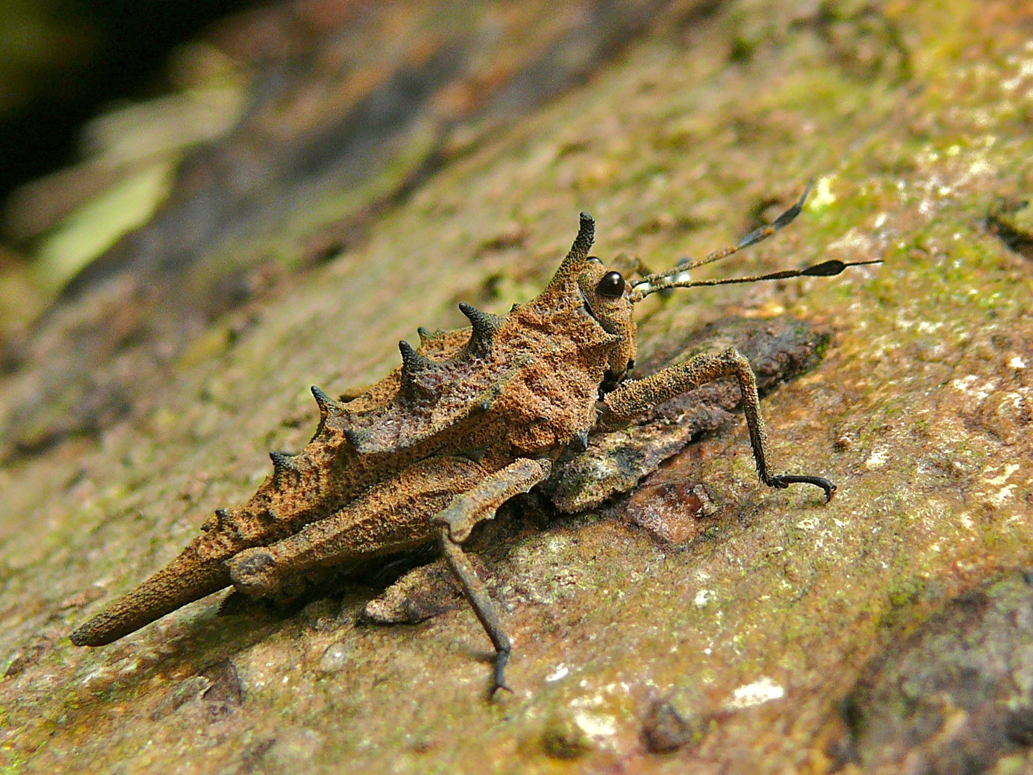 Gunung Mulu NP, Sarawak, MALAYSIA